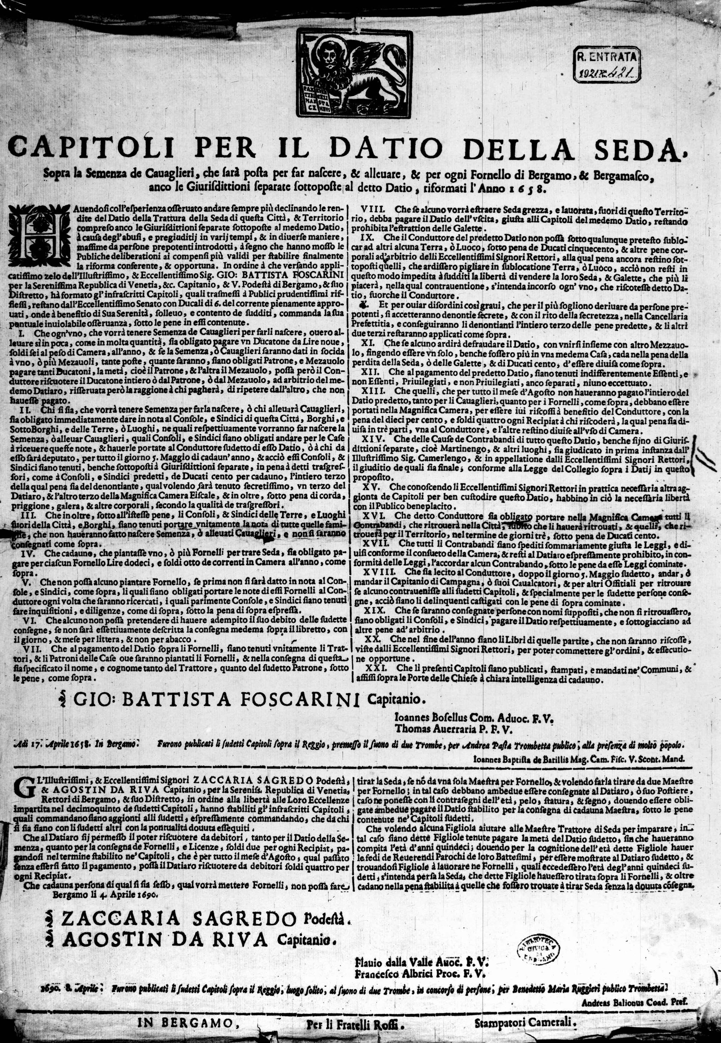 Frontespizio